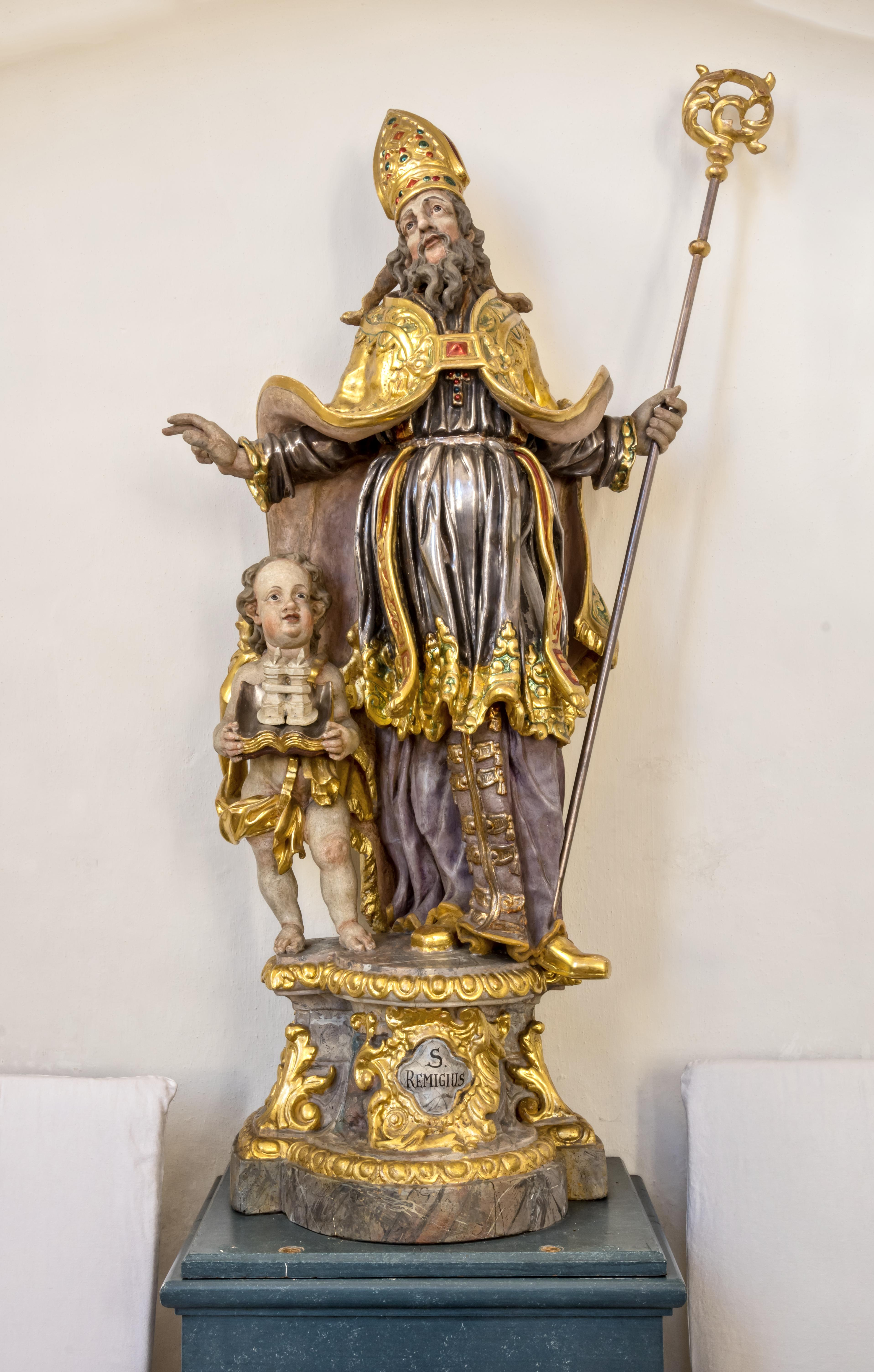 Bilder aus der katholischen Kirche St. Remigius in Merdingen St. Remigius